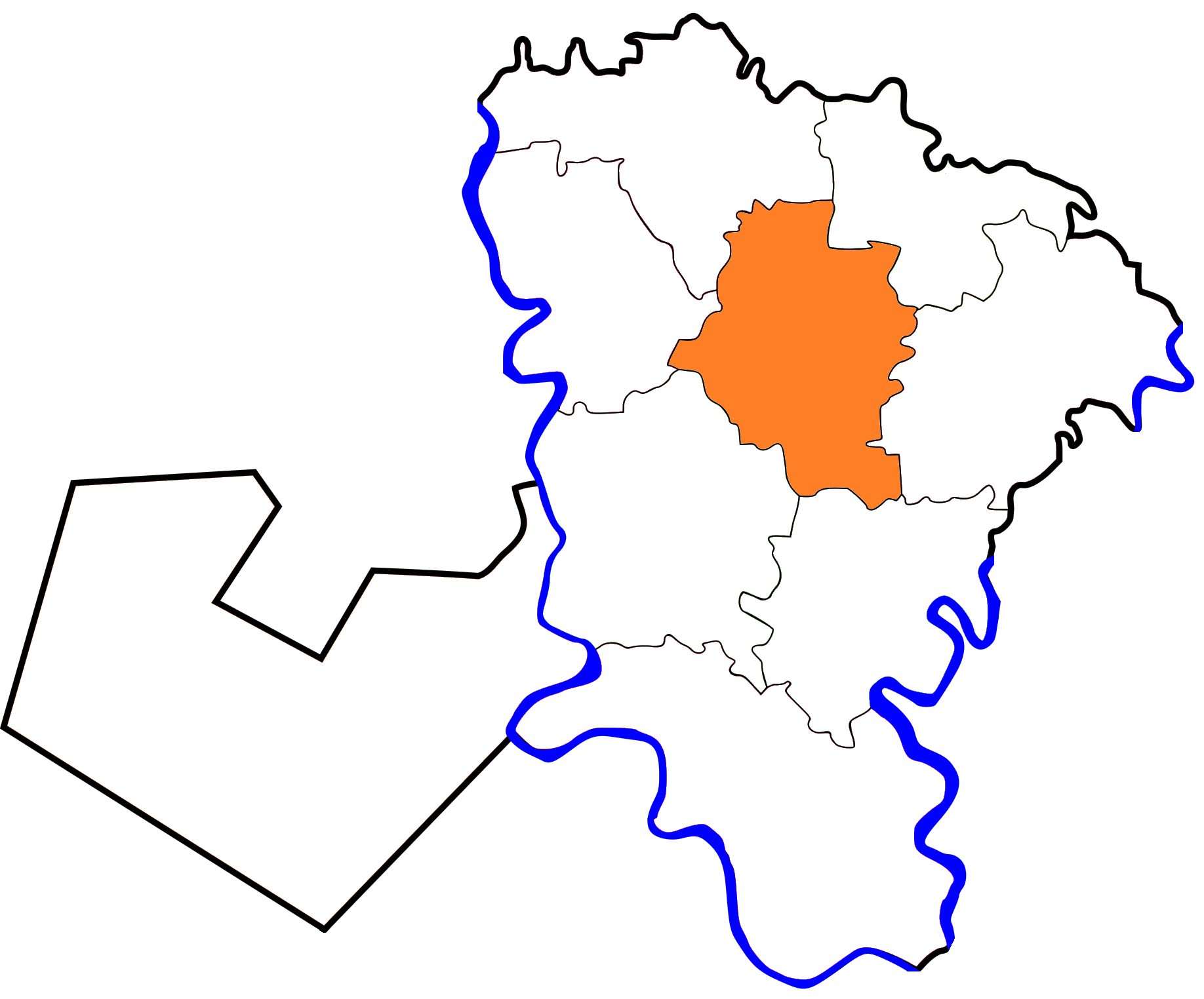 خريطة مركز شبين الكوم بالنسبة لمحافظة المنوفية، مصر.